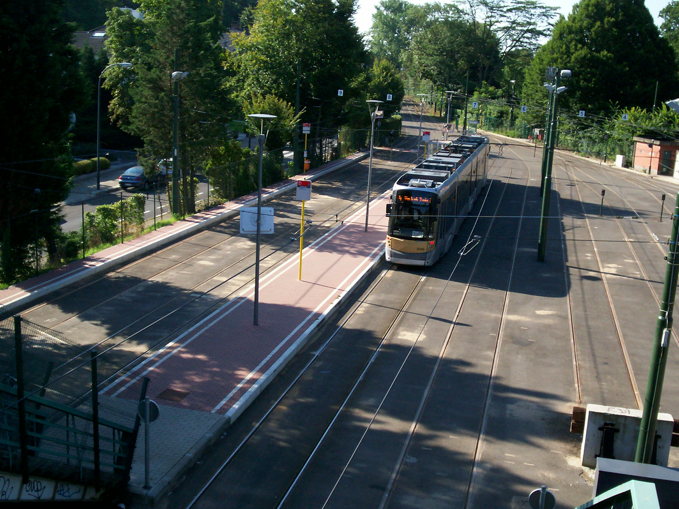 Vue aérienne du prochain T3000 de la ligne 4 au départ d'"Esplanade"